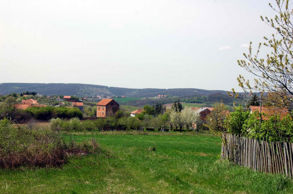 Nenadovac